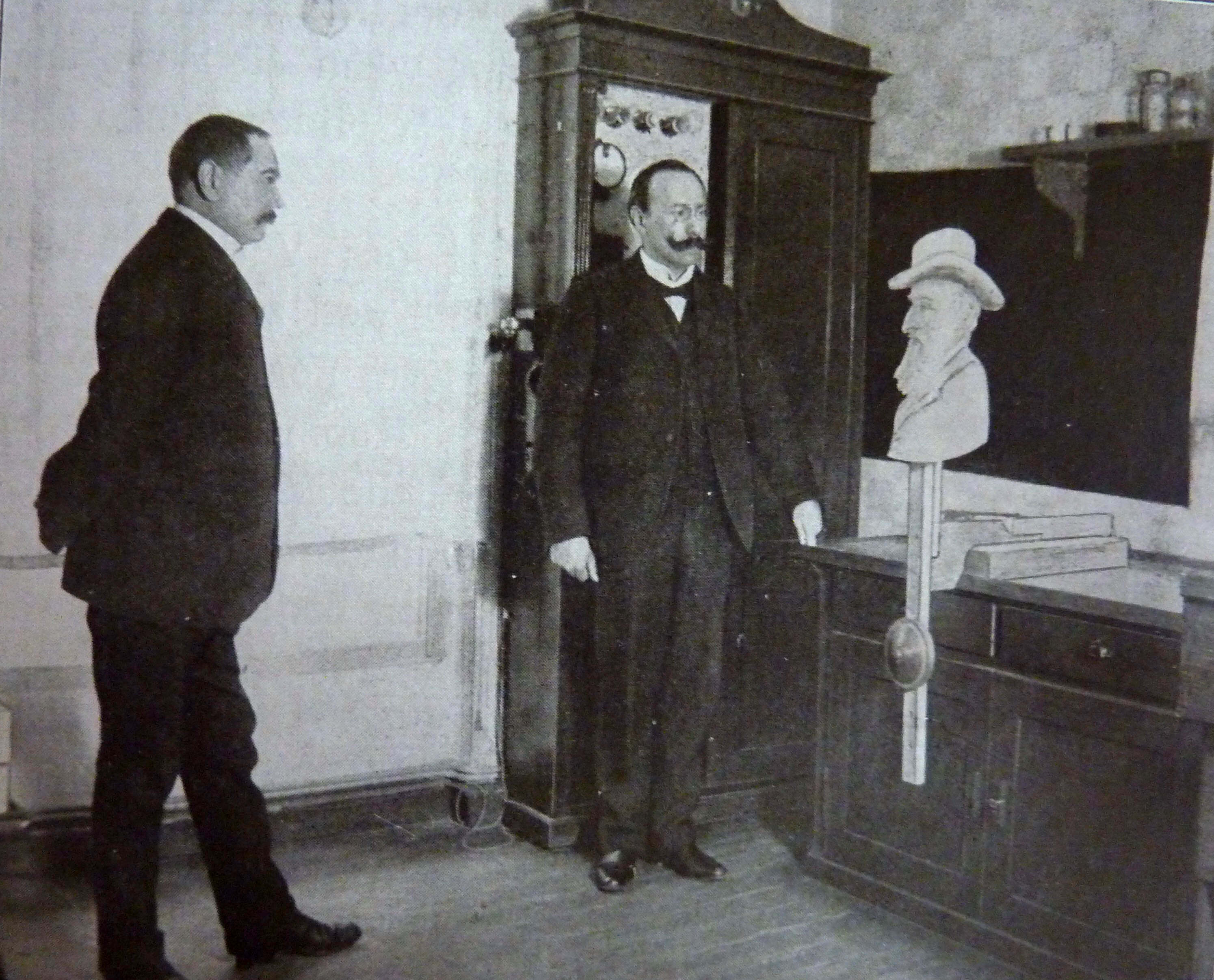 Versuch, die Wahrnehmbarkeit minimaler Bewegungen zu erforschen. Das Bild zeigt möglicherweise den Ingenieur L. J. Busse (links) und Karl Krall